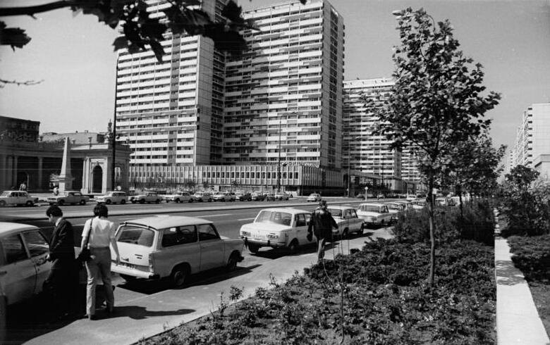 This description has been identified as biased or incorrect: DDR-PropagandaADN-ZB Kasper 20.5.81-wo-Schöne DDR-Berlin: Blick auf die modernen Wohnhäuser in der Leipziger Straße. Zusammen mit den in neuer Schönheit erstandenen Spittelkolonaden (hinten l.) bilden sie ein interessantes architektonisches Ensemble.